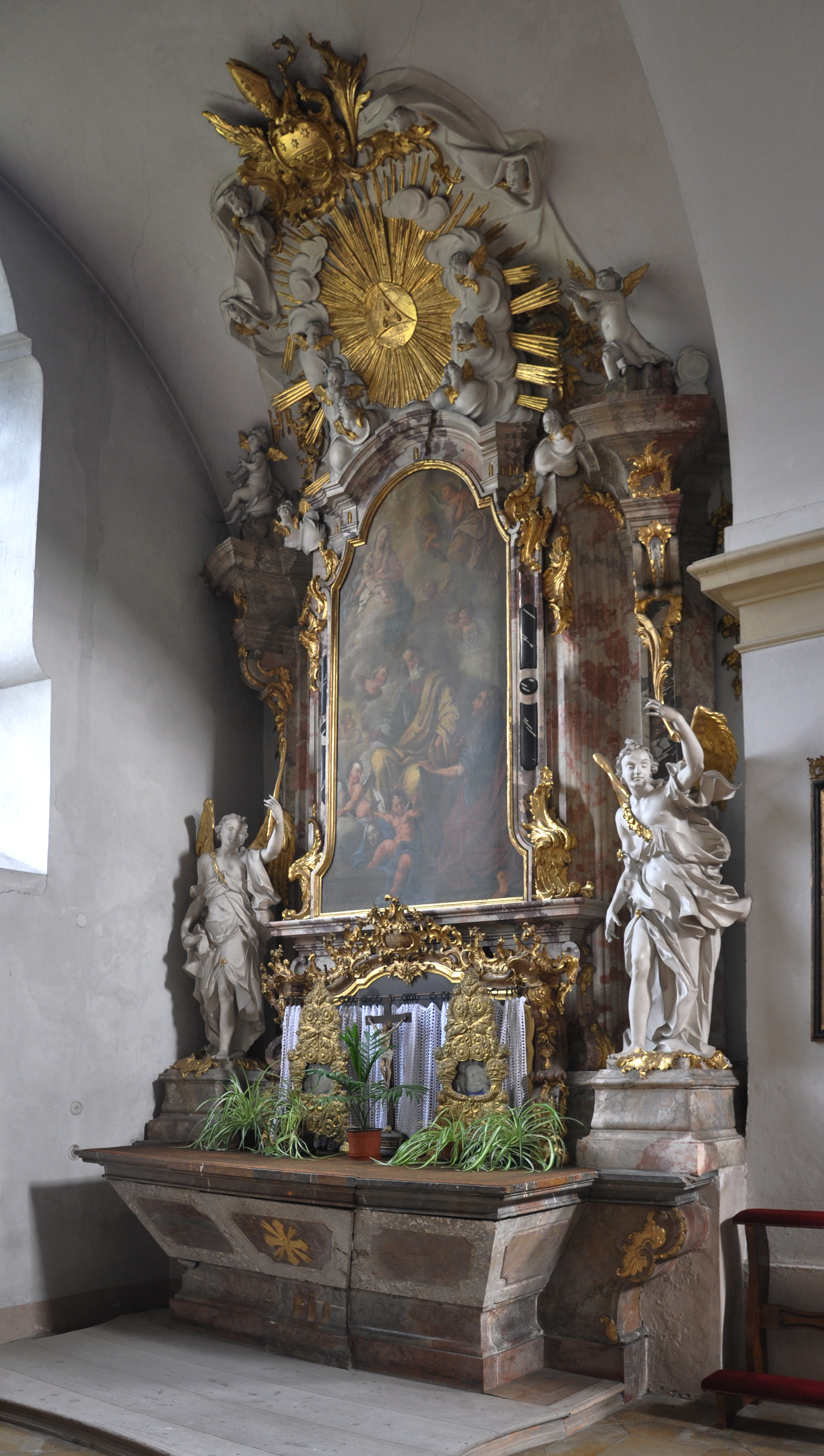 Stiftskirche Reichersberg, Oberösterreich Stuckmarmoraltar von Johann Baptist Modler (1762), Altarblatt: Apostel Simon und Judas Thaddäus von Kolbinger (München 1763), auf der Mensa die Reliquien des Katakombenheiligen Claudius